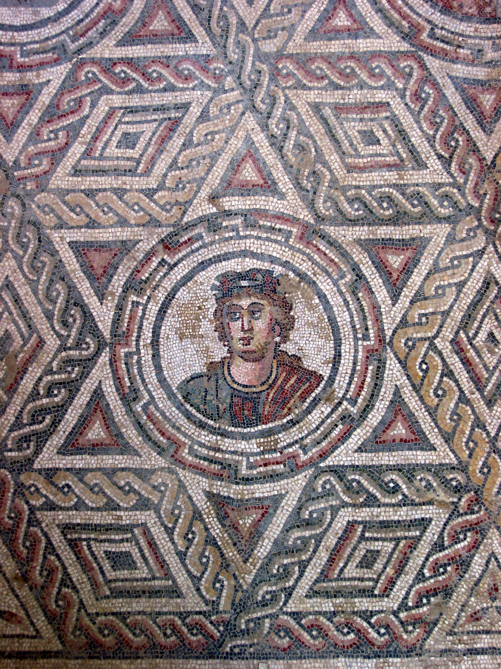 Villa Romana del Casale, Piazza Armerina, Sicily/Sicilia, Italy/Italia